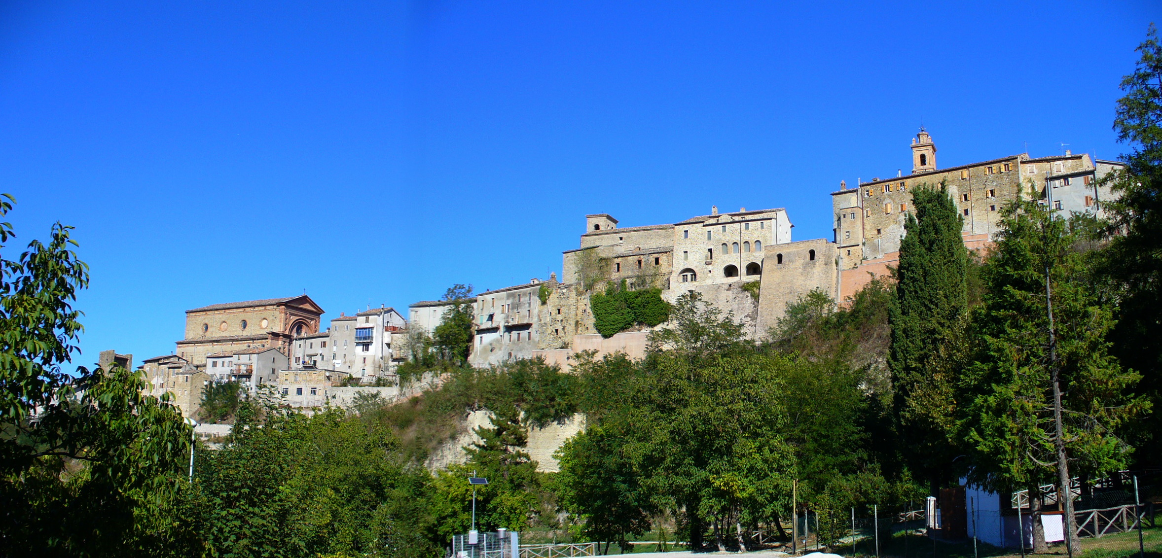 Panorama di Force (AP), Italy